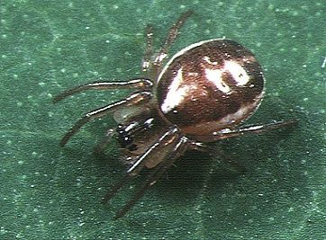 female Hypsosinga sanguinea from Okinawa.